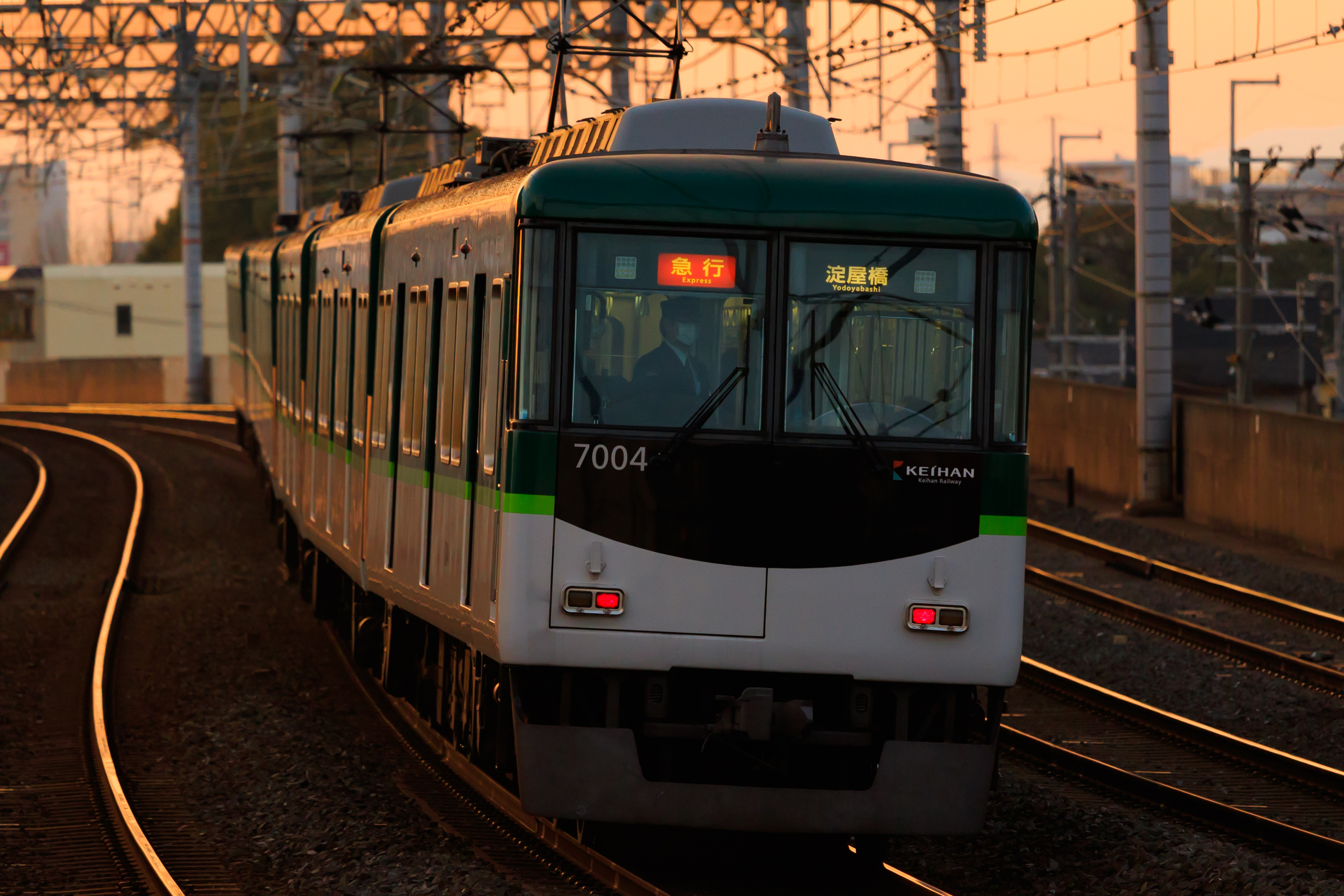 2017年最初の夕暮れの複々線を6000系から編入された #京阪7000系 が淀屋橋へ向かう 。 #元日 撮影。